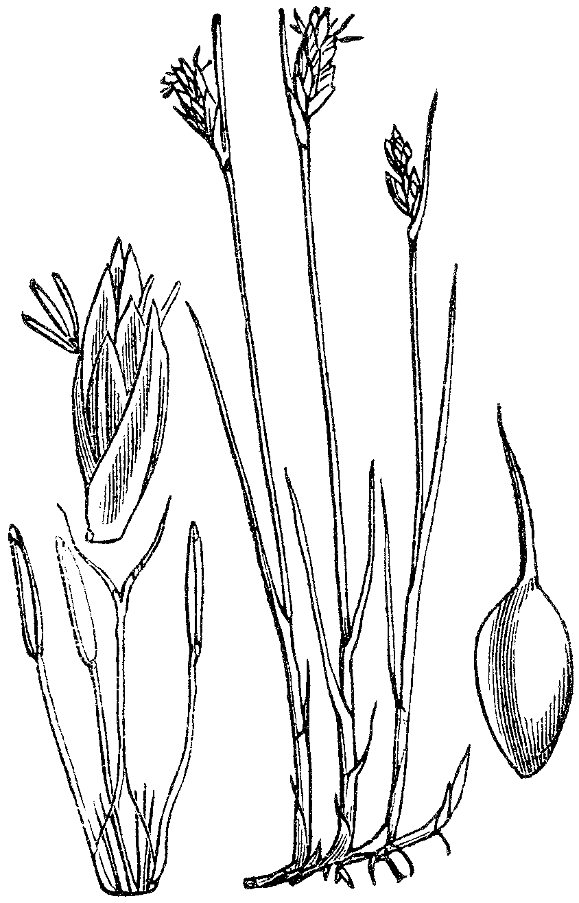 Slika 480. Stisnjena srpica. (Scírpus compréssus.) [sic!]